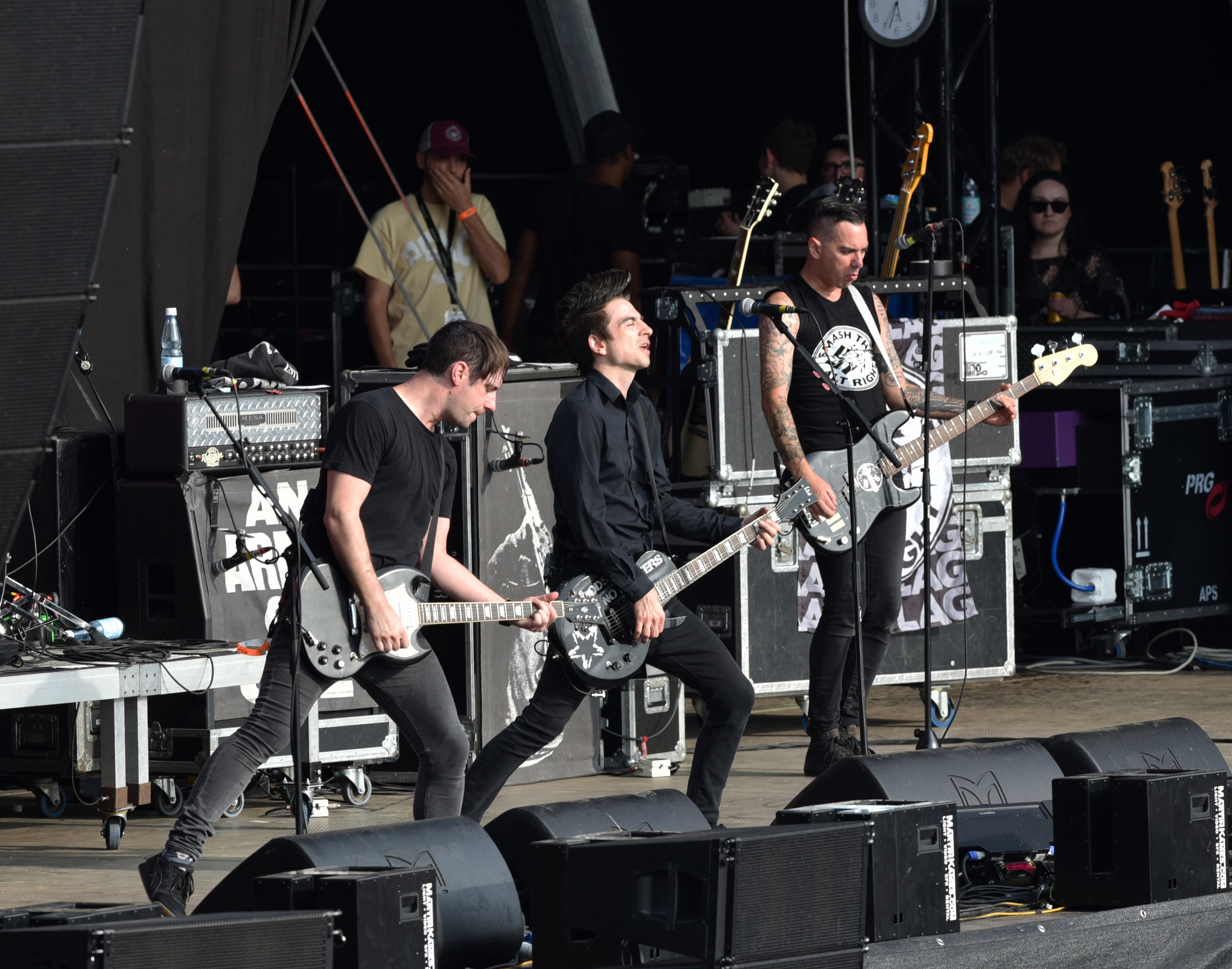 Anti-Flag beim Reload Festival 2017